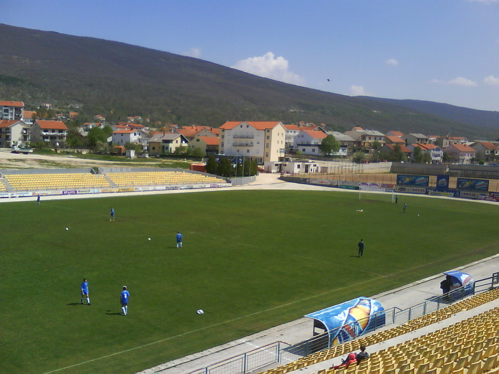 Mokri Dolac football stadium in Posušje